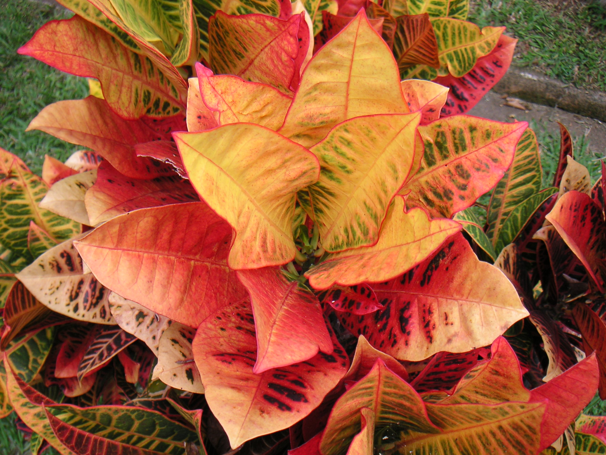 Codiaeum variegatum, Euphorbiaceae, Cali / Kolumbien